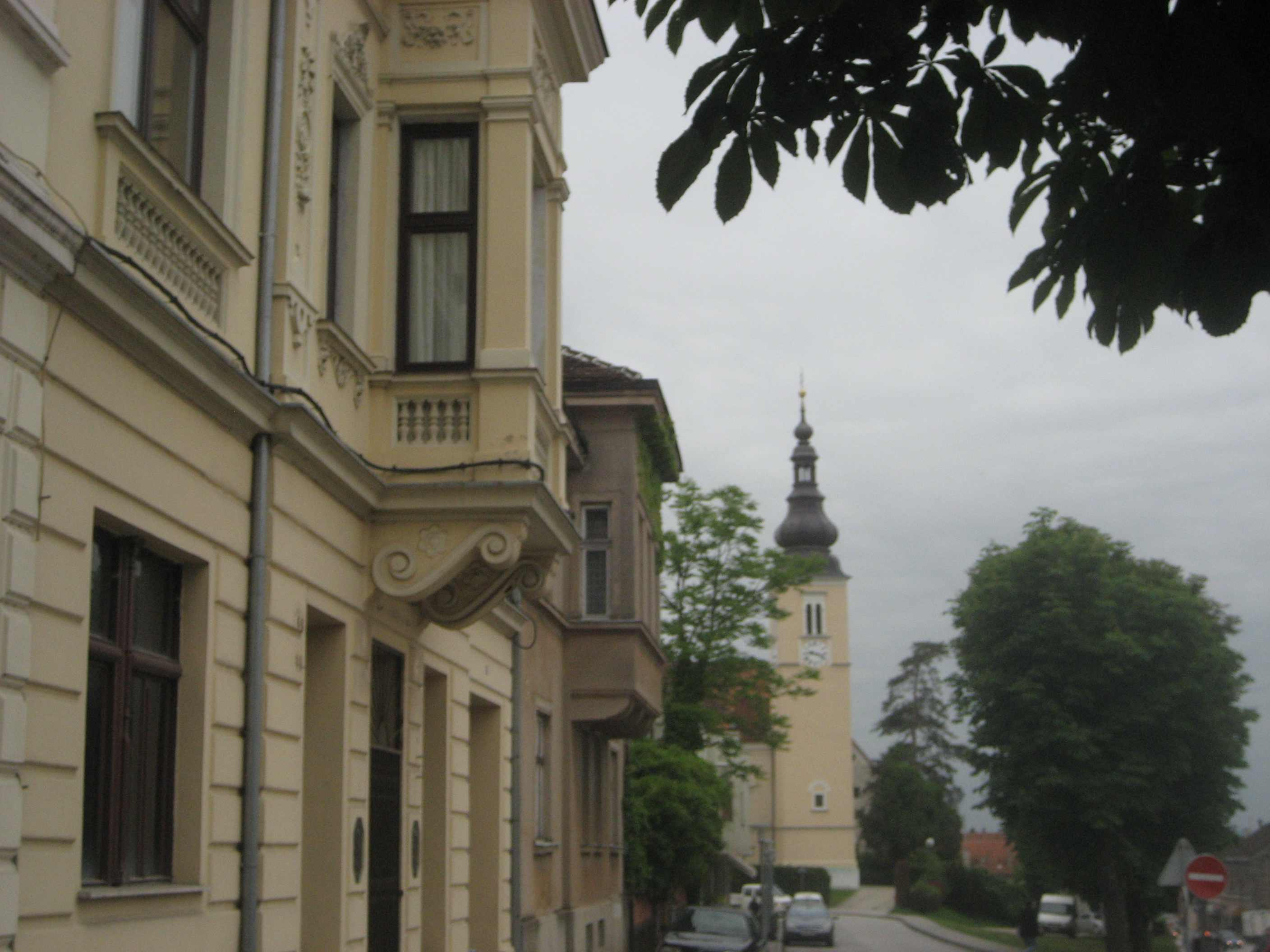 Jastrebarsko, Croatia